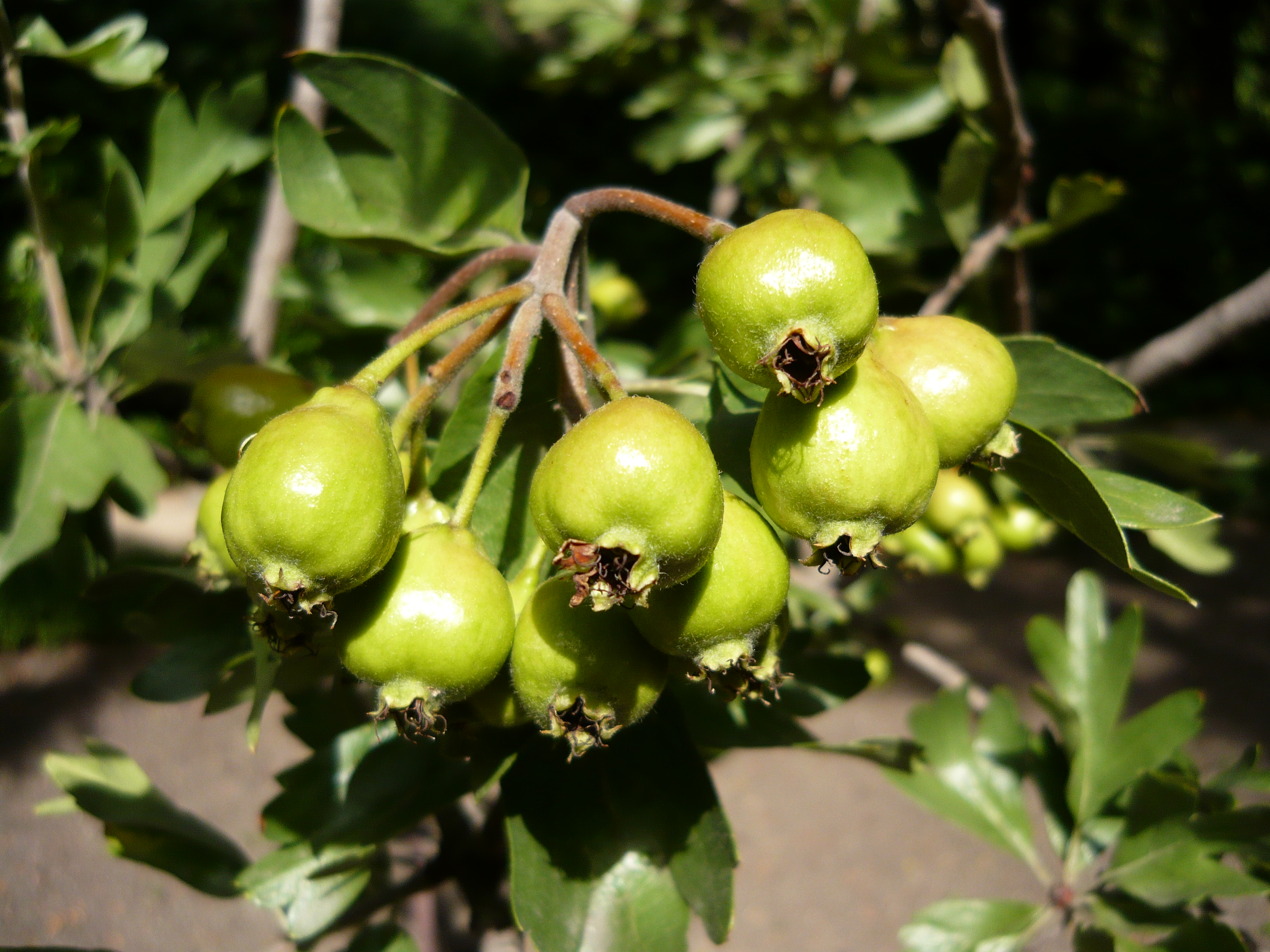 Crataegus azarolus, acerolo. Real Jardín Botánico de Madrid.